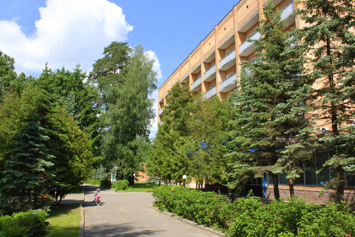 Санаторий "Кстово"